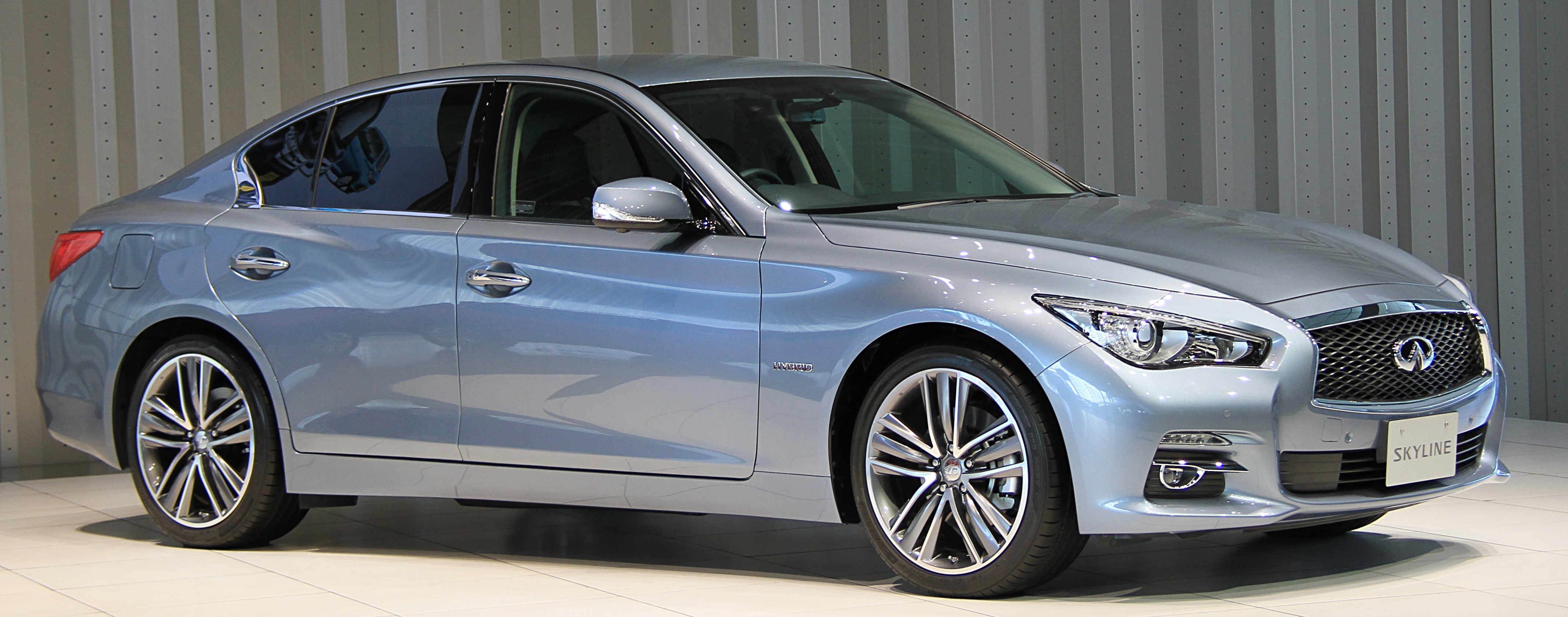 Nissan Skyline